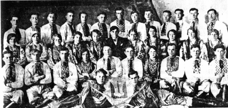 Хор читальні "Просвіта" села Деренівка